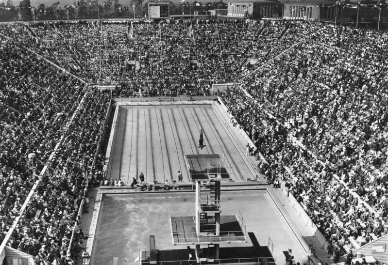 Olympiade 1936. Hochbetrieb im Olympischen Schwimmstadion. Blick auf die Gesamtanlage während des Kunstspringens.